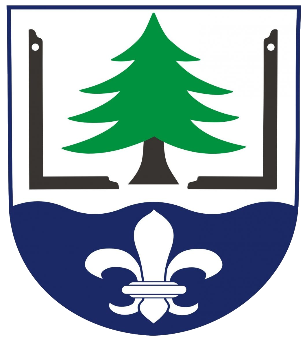 znak obce Komárovice (okres Třebíč).